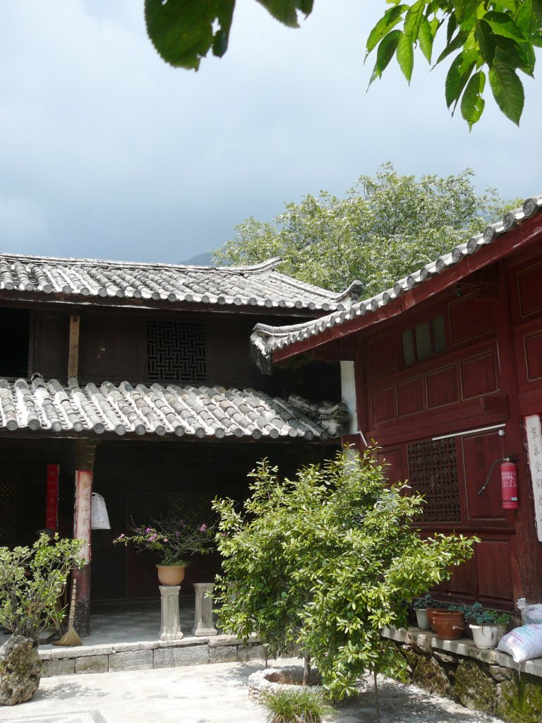 Wohnhaus Dr. Joseph Rock in Baisha